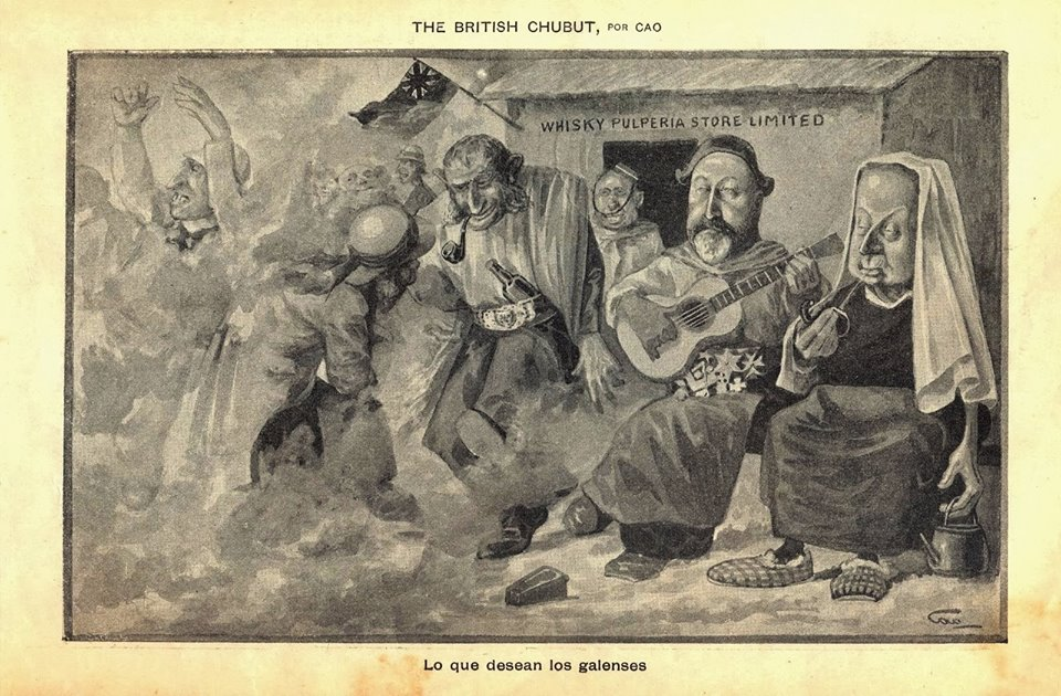 José María Cao con motivo de la visita al VIRCh por Julio A. Roca y publicada en Caras y Caretas en 1899. Se parecia una enseña roja del Reino Unido.